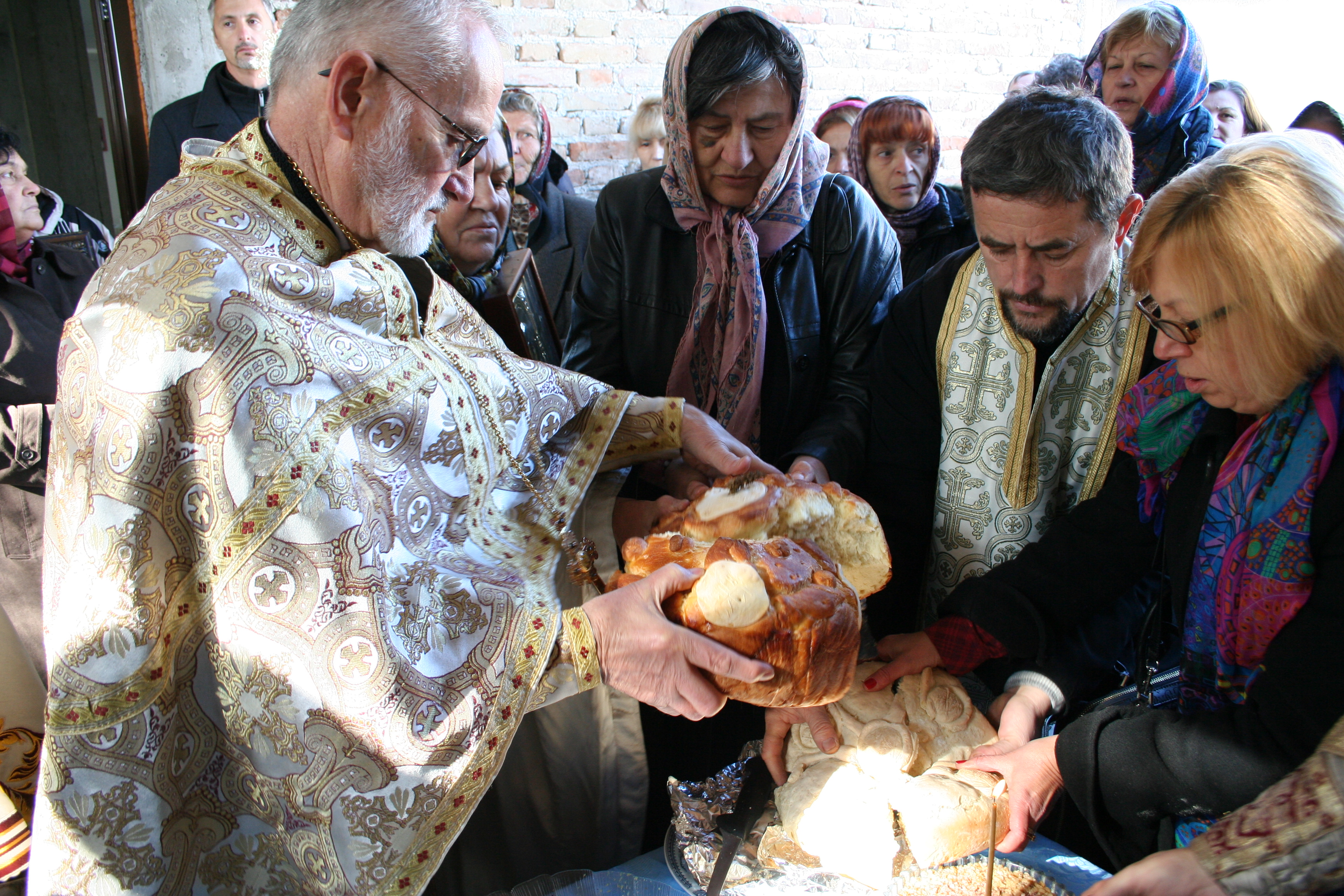 Slava crkve ikone Bogorodice Kazanjske, Provo